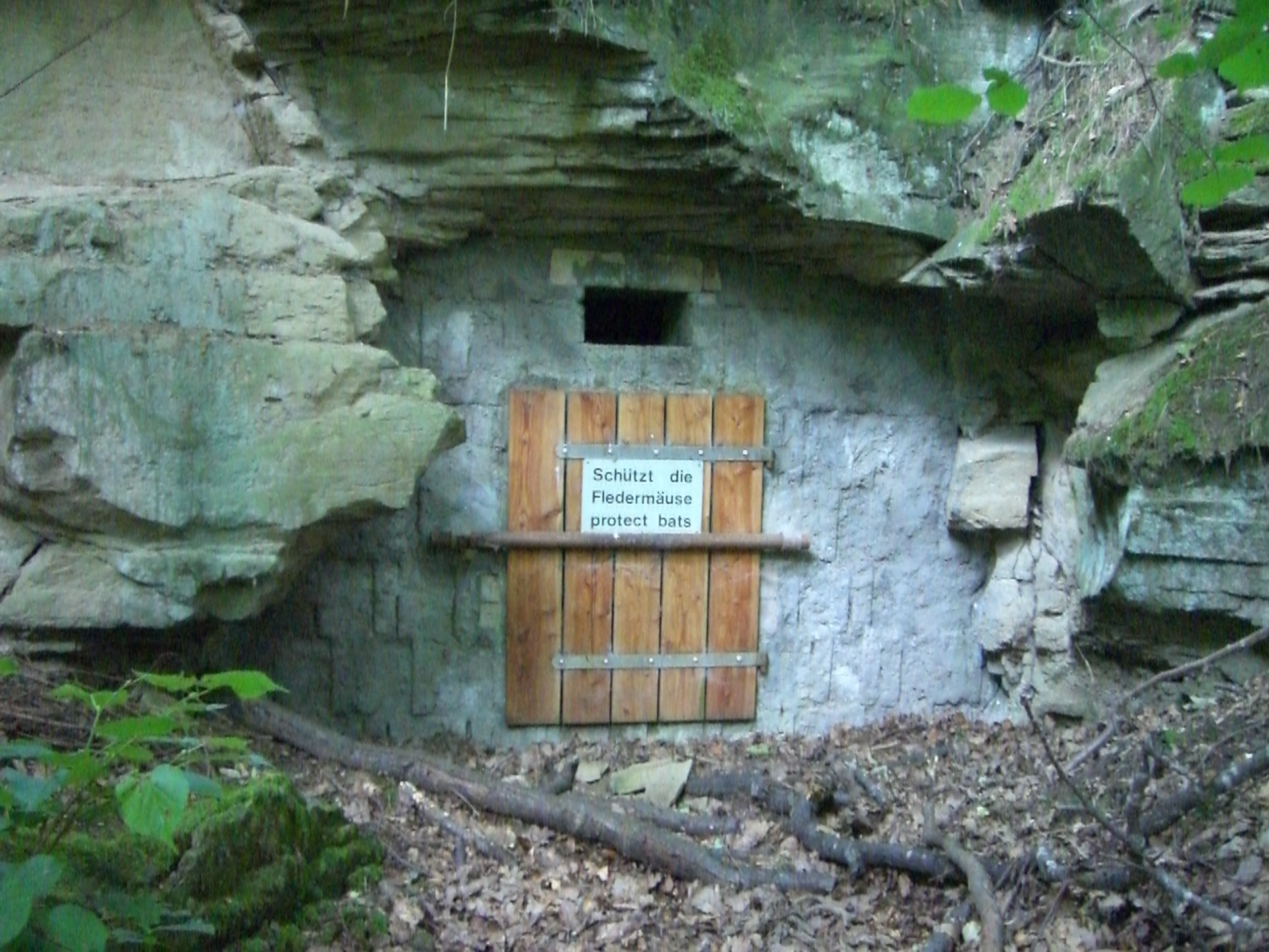 Fledermausschutz am Felsenkeller in Westheim